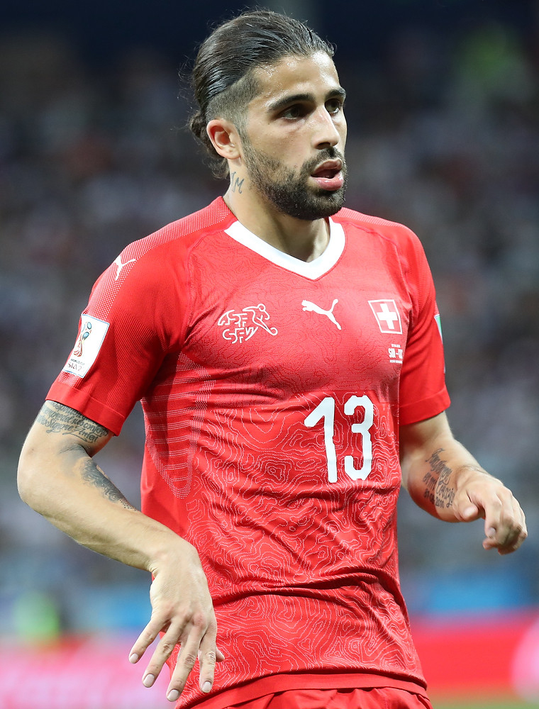 Швейцария играет вничью с Коста-Рикой и выходит в плей-офф ЧМ со второго места в группе